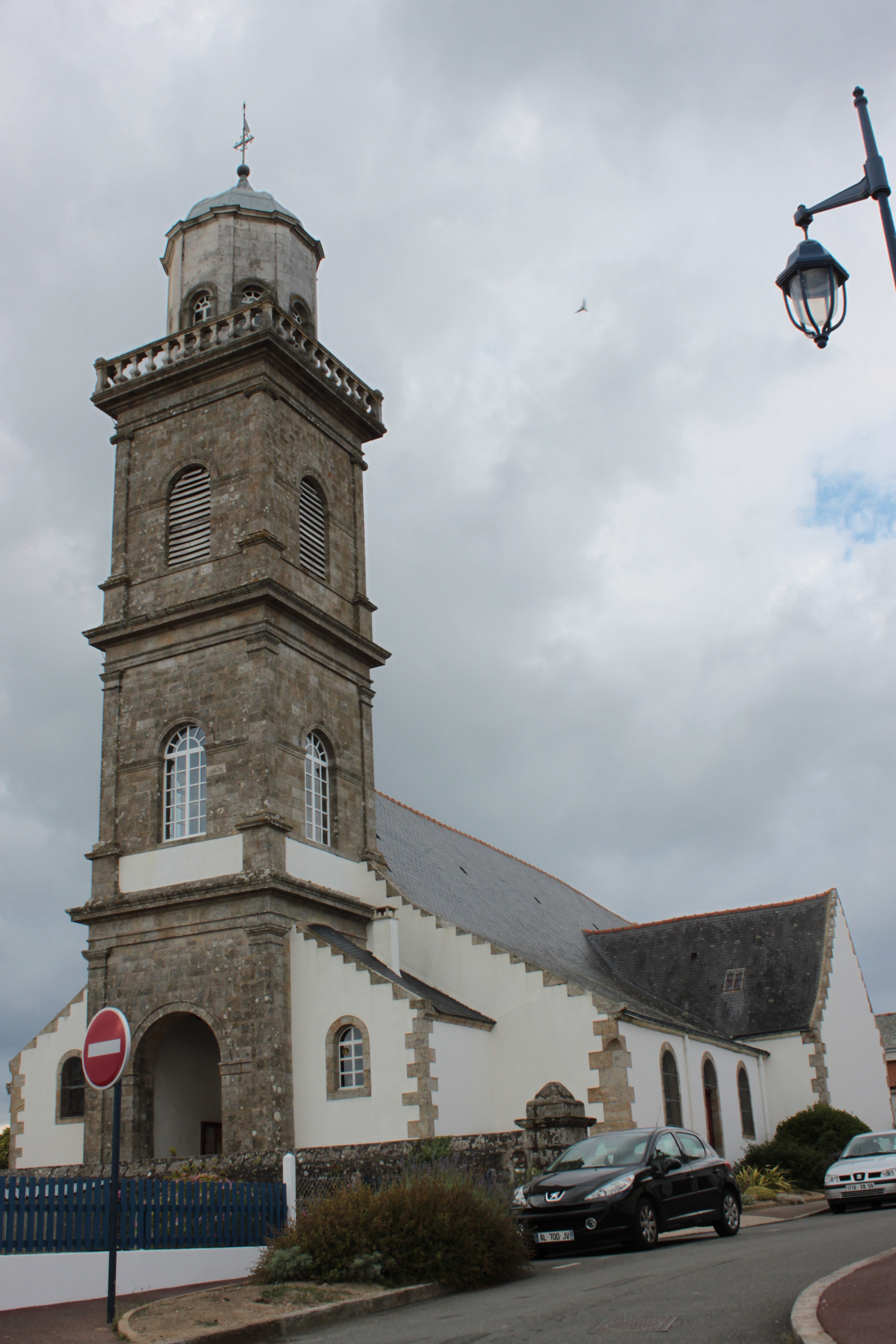 Église Saint-Maxent de Billiers (Morbihan). Fr-56-Billiers.